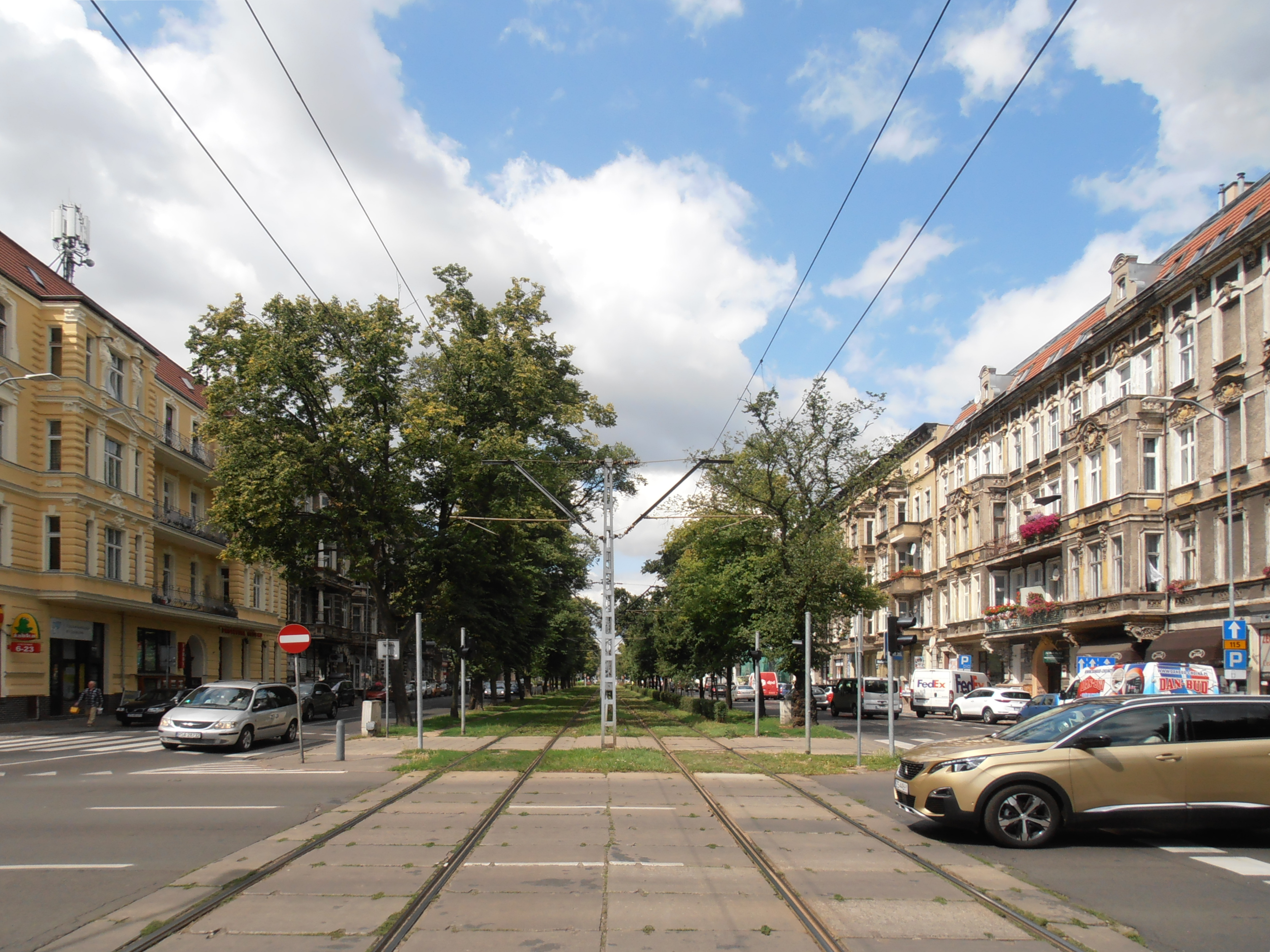 ul. marszałka Józefa Piłsudskiego w Szczecinie; odcinek między pl. Grunwaldzkim a pl. Odrodzenia.